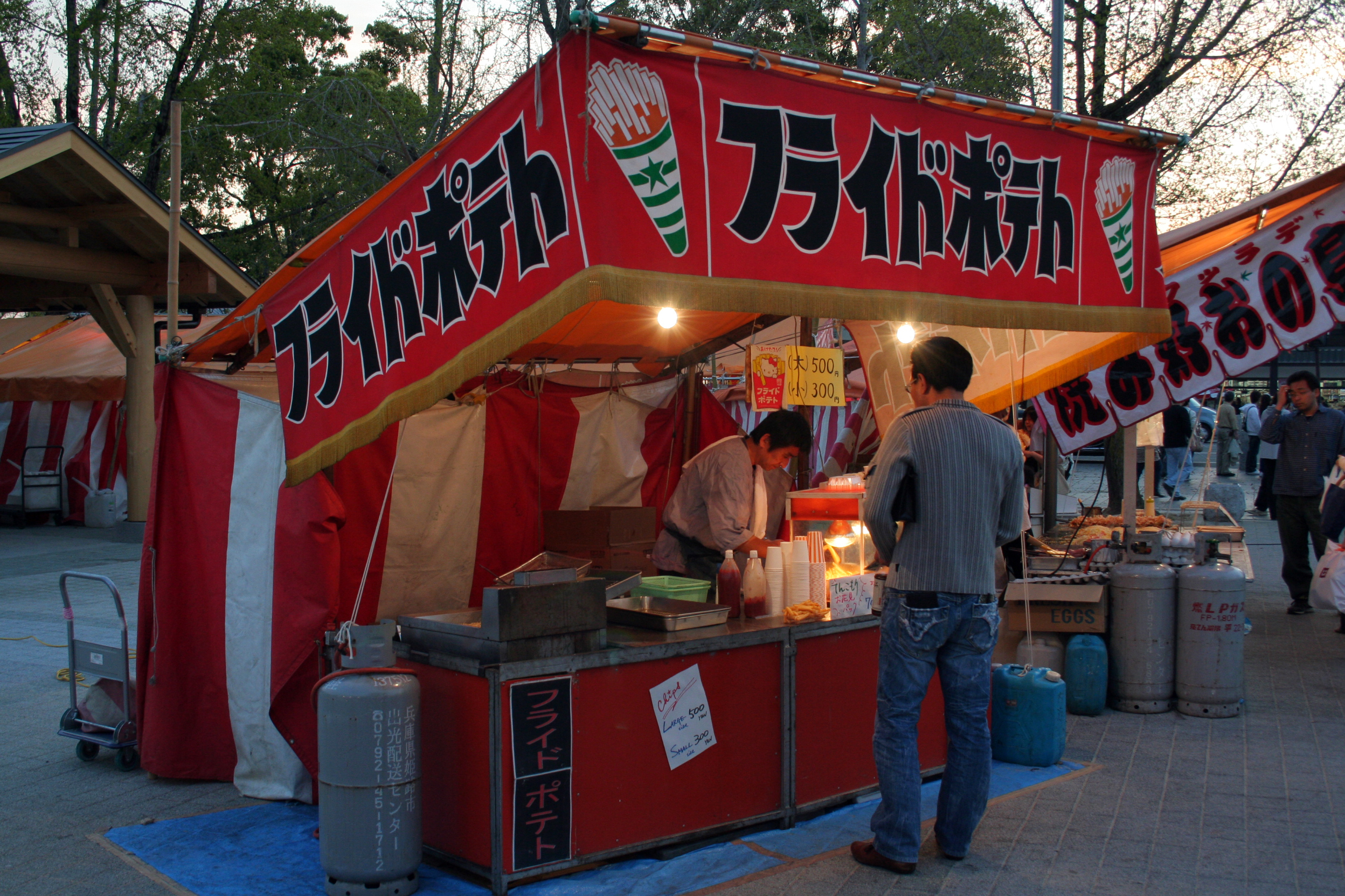 日本の飲食物などを提供する屋台。 フライドポテトの屋台。